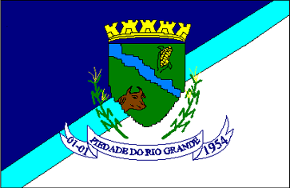 Bandeira do Município, disponibilizada pelo município